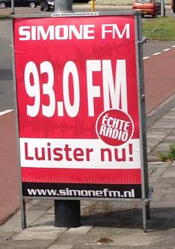 Posters van Simone FM